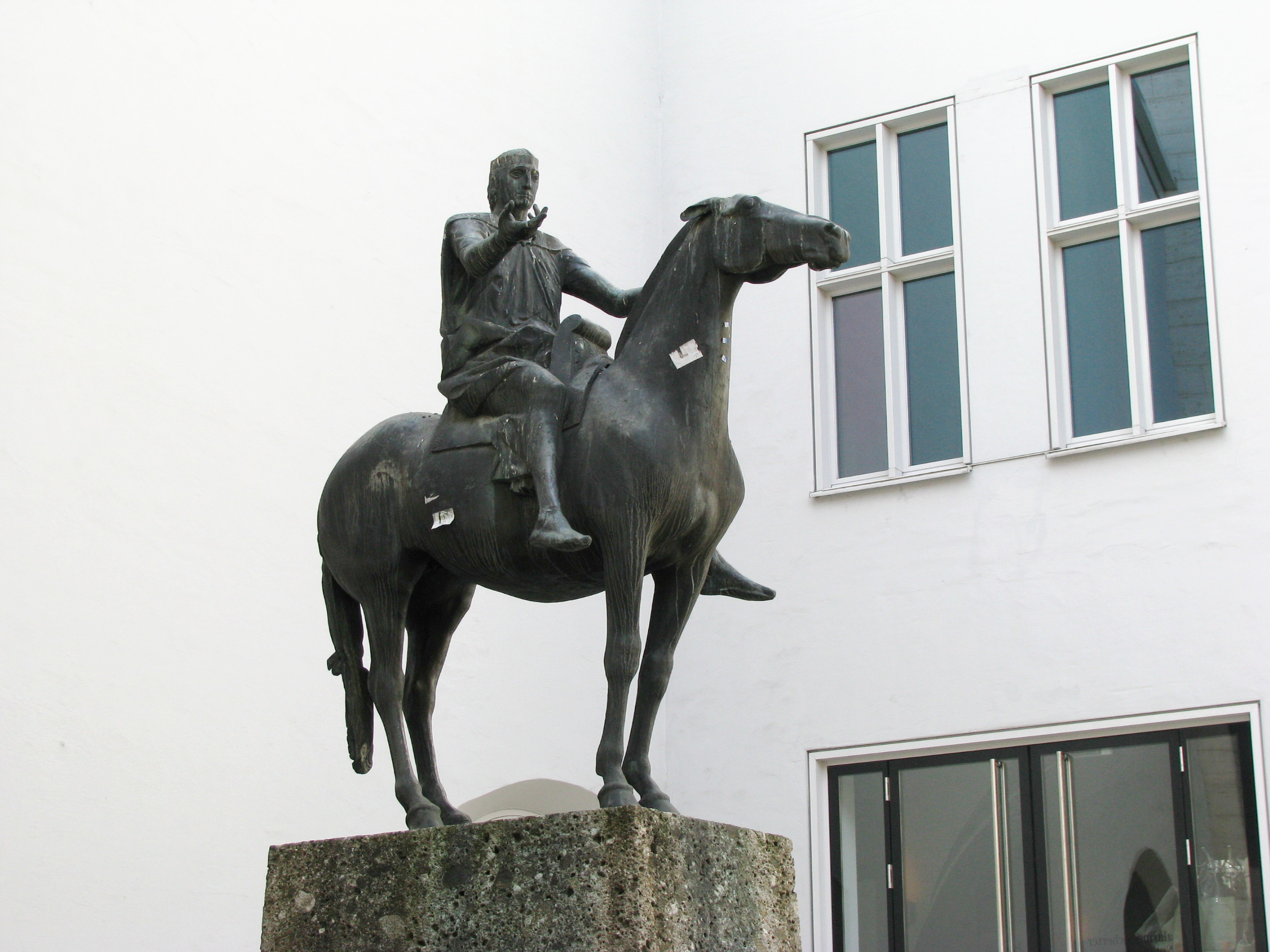 Reiterstandbild Kaiser Ludwigs des Bayern